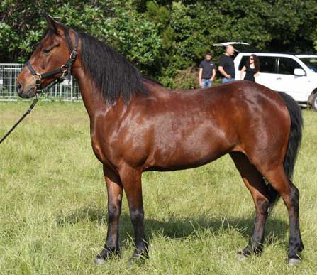 Presentation d'une jument a un modele et allure en race Corse